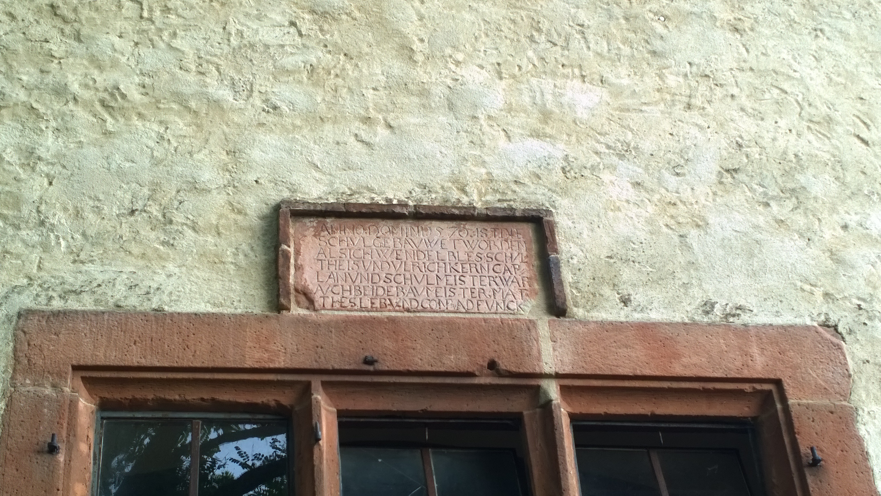 Inschrift der mittelalterlichen Kapelle in Schaafheim (Hessen)